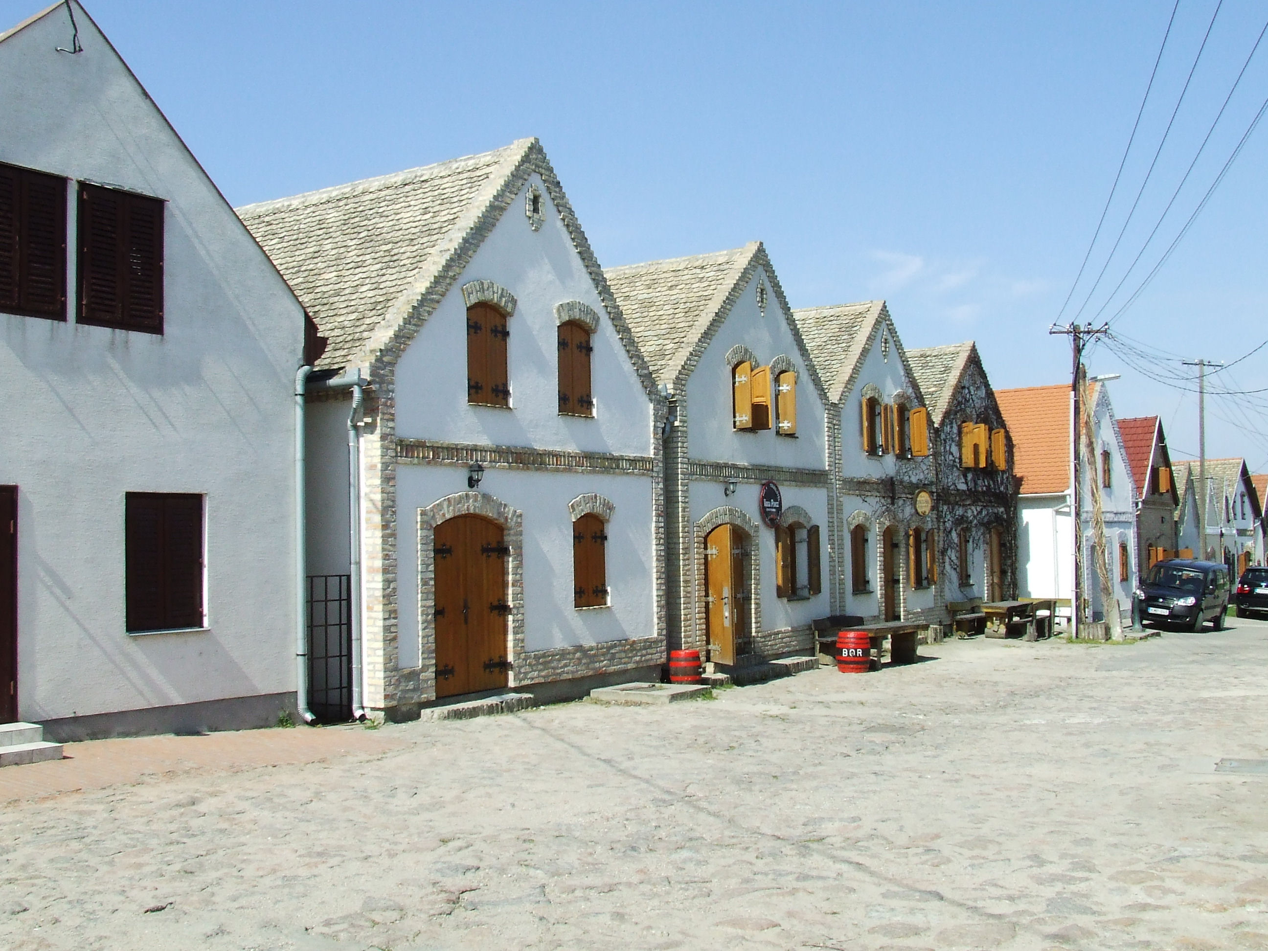 A hajósi pincefalu. Európa legnagyobb összefüggő pincefaluja